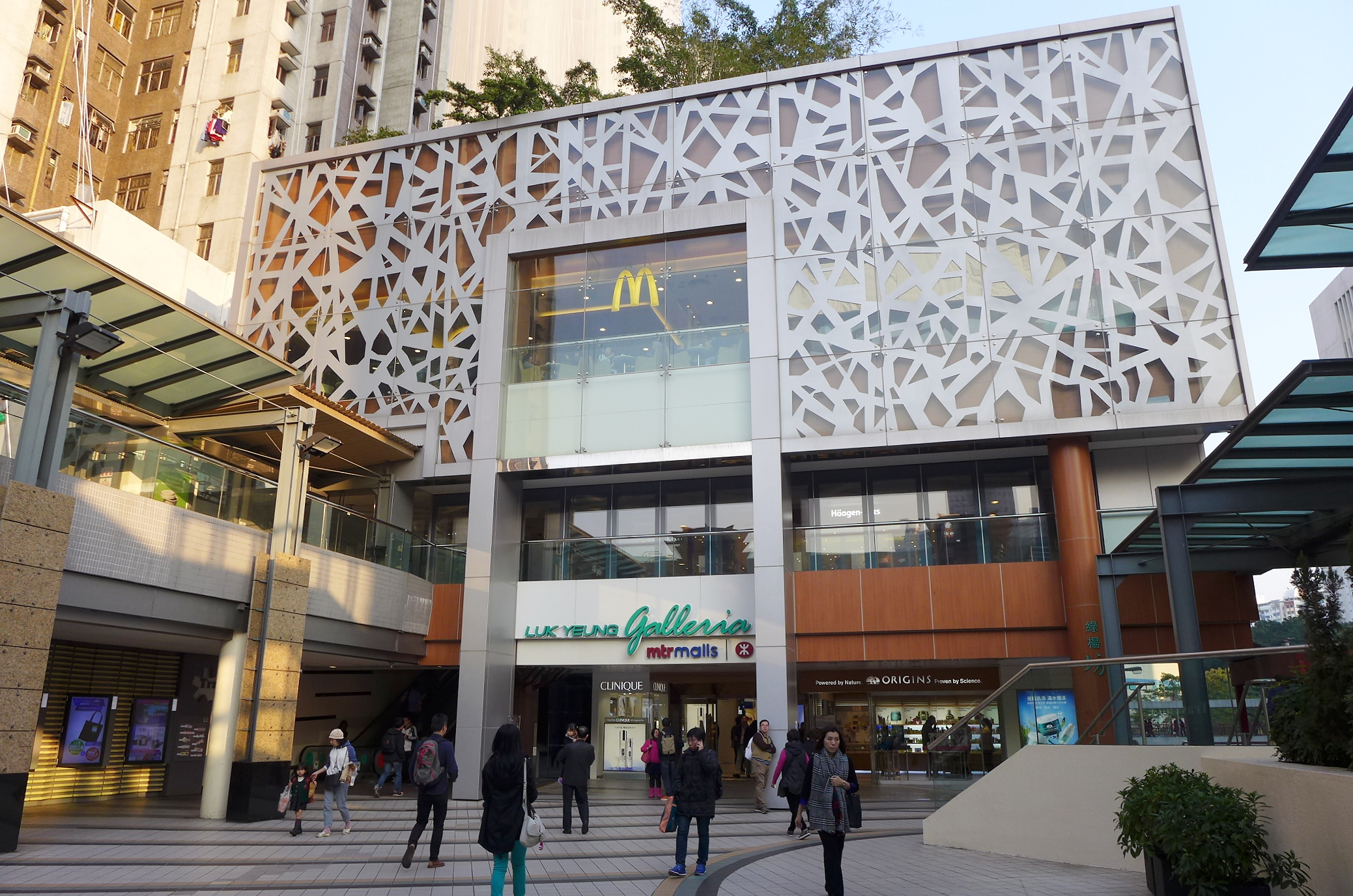 Luk Yeung Galleria